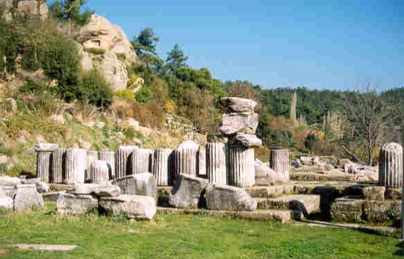 Labranda, Tempel des Zeus, Bild Thomas Kutzli, Januar 2003, GNU-FDL